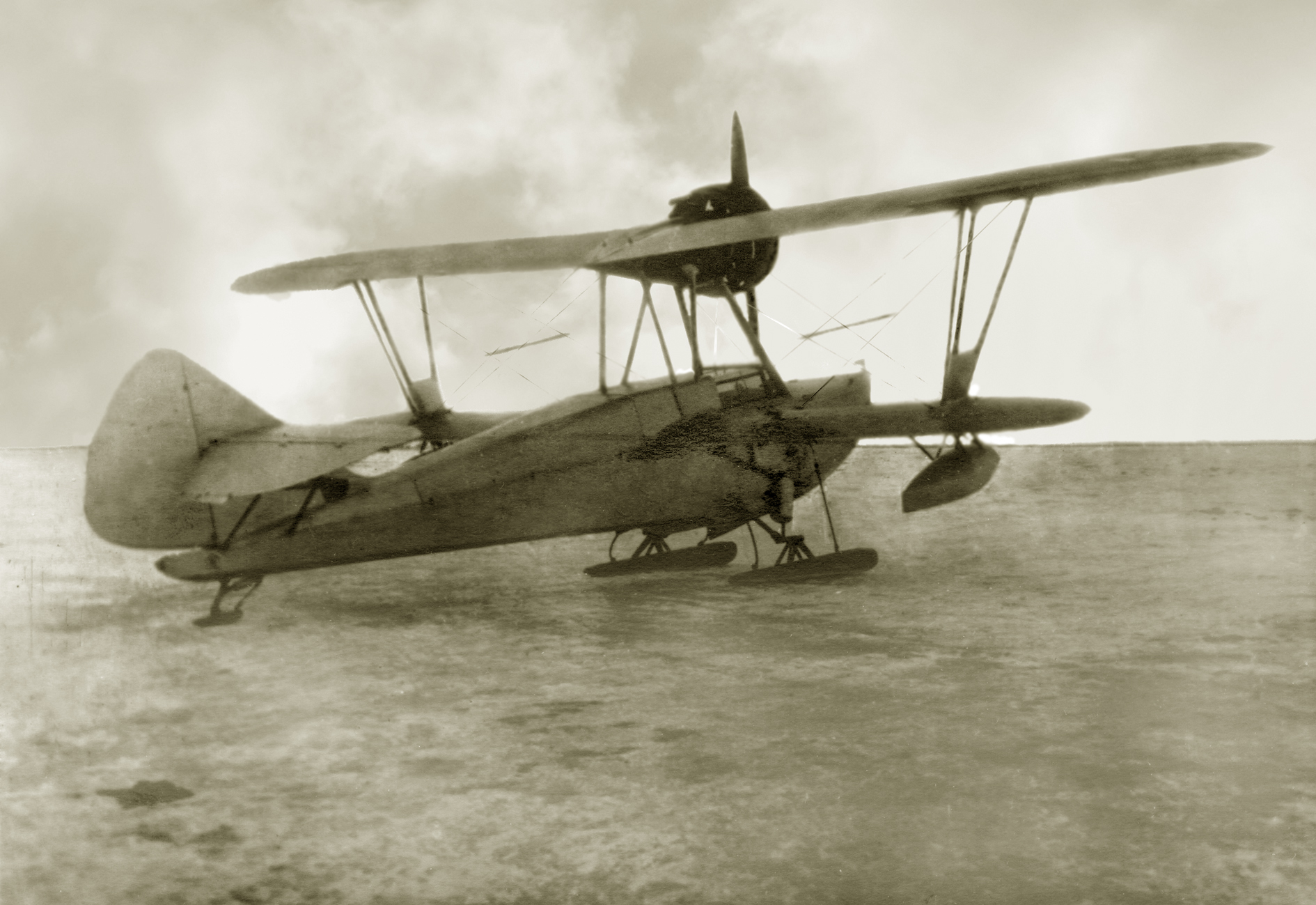 Амфибия Н.Г. Михельсона Му-4 (Amphibian NG Michelson My-4)